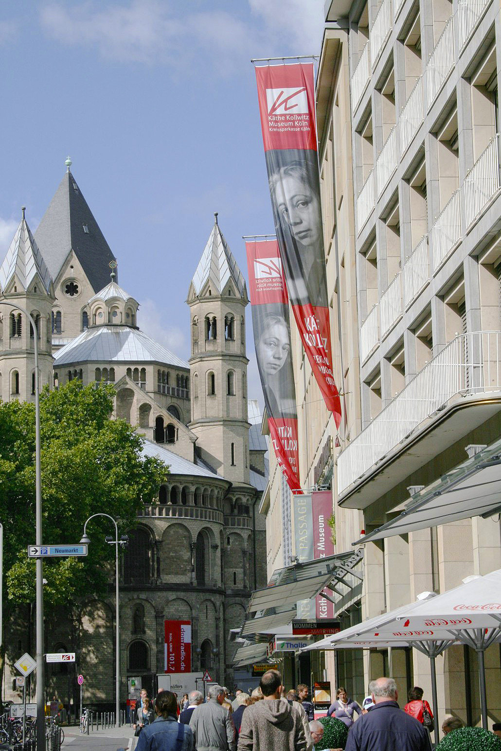 Fassade des Käthe Kollwitz Museum Köln mit Fahnen. Blick in Richtung St. Aposteln.